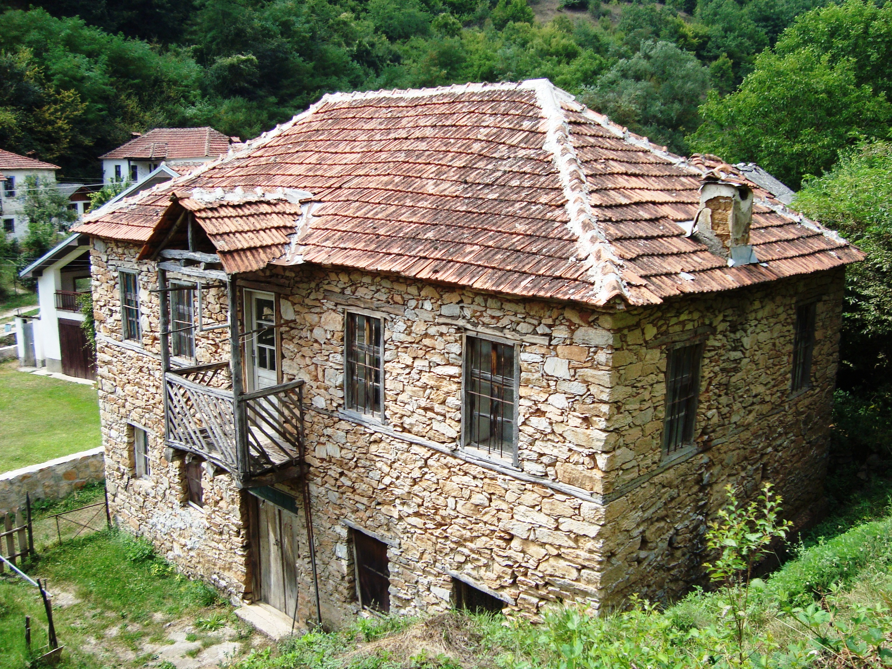 Къща в Доленци, Демир Хисар, Република Македония.